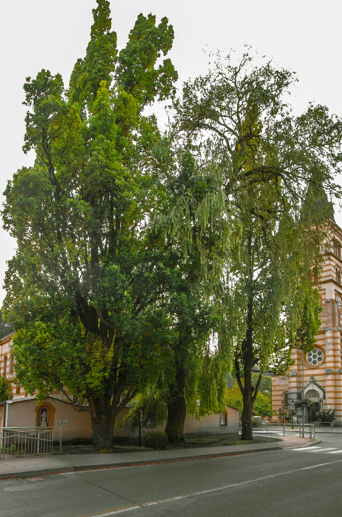 památné stromy Císařské duby v Kraslicích, okres Sokolov